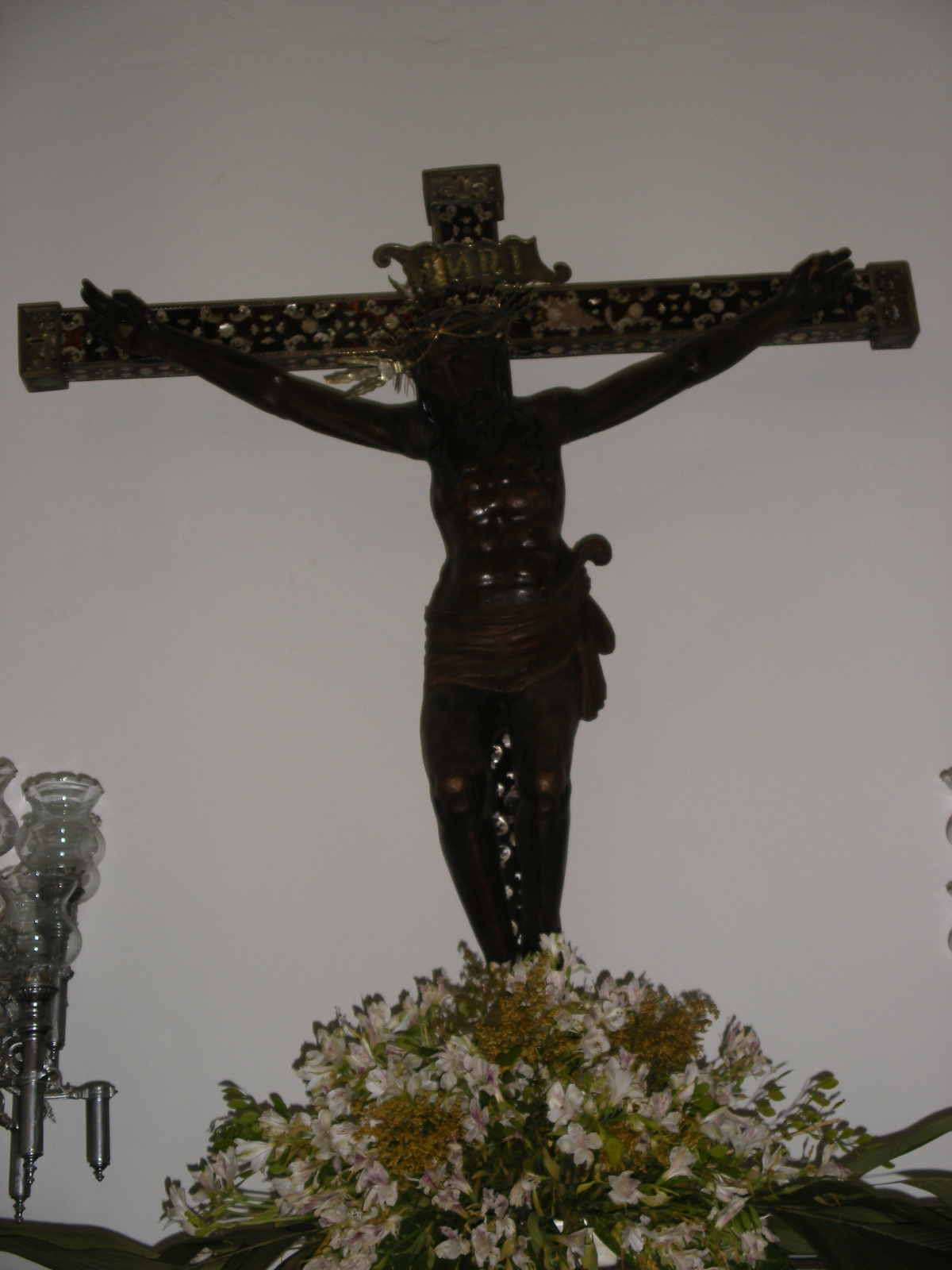 Cristo Negro de Gibraltar, Catedral de Maracaibo